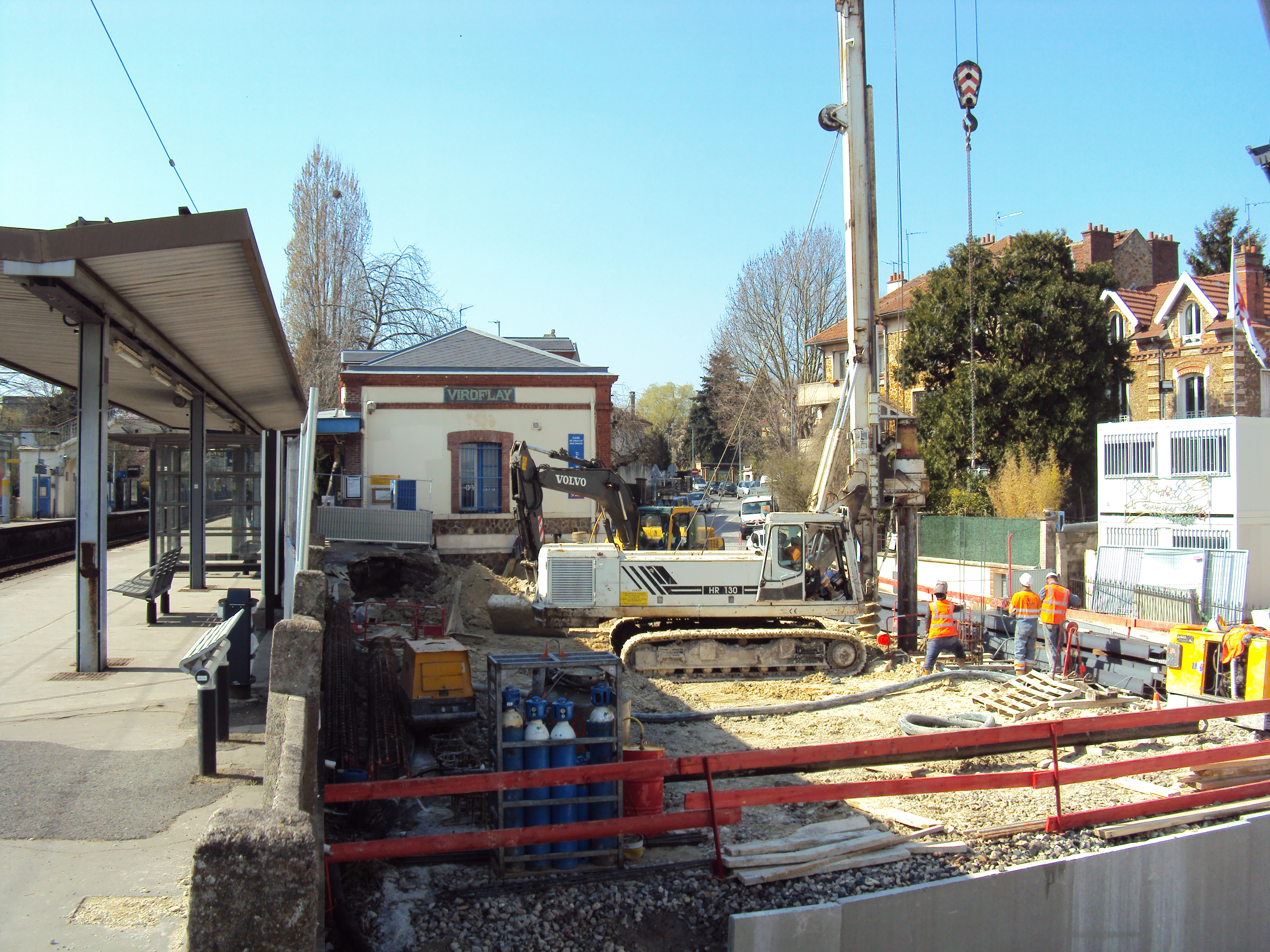 Gare de Viroflay-Rive-Droite, Mars 2012. Au premier plan, travaux de fouille pour le terminus souterrain du T6 et derrière le bâtiment voyageurs